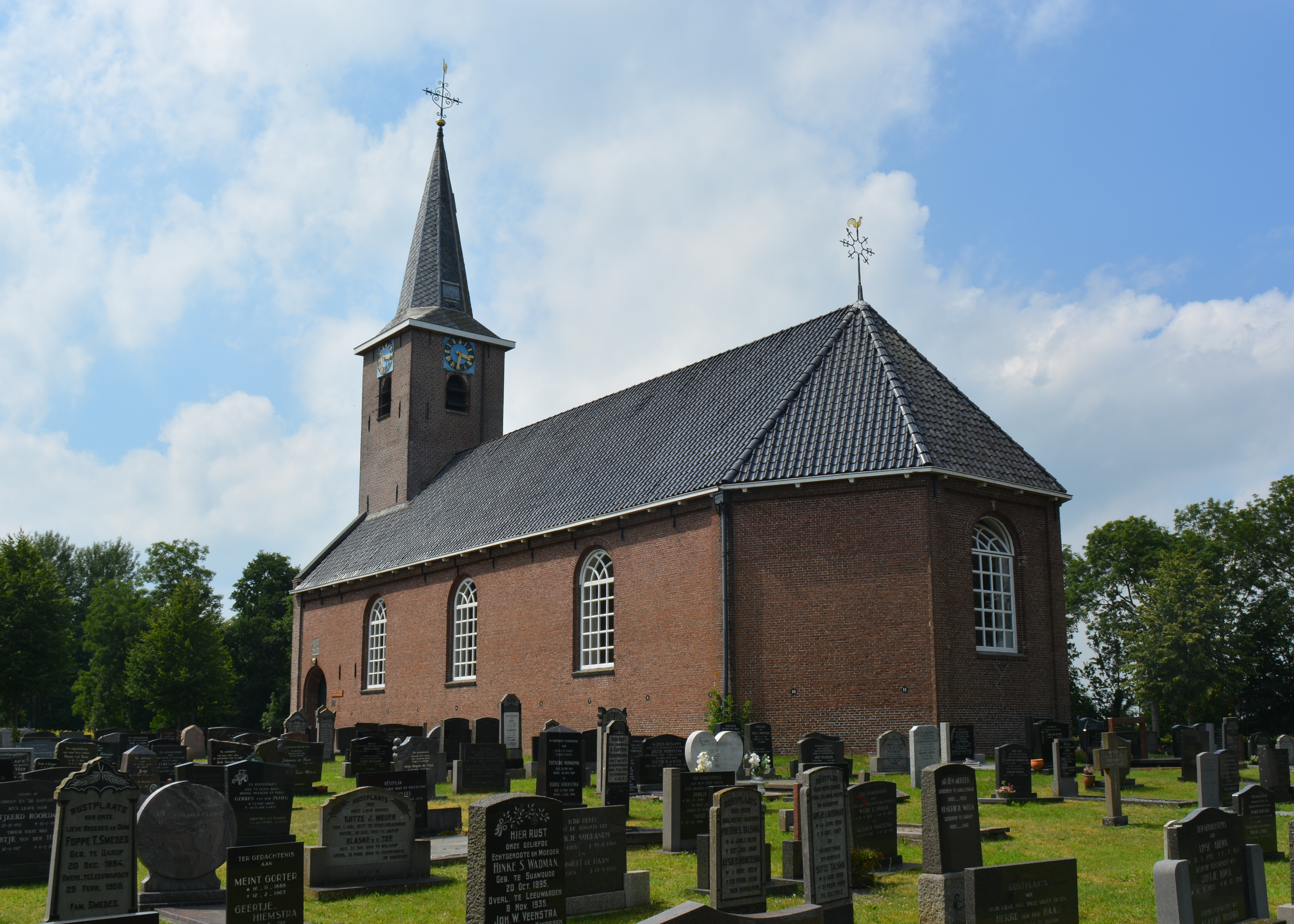 Garyp, Petruskerk